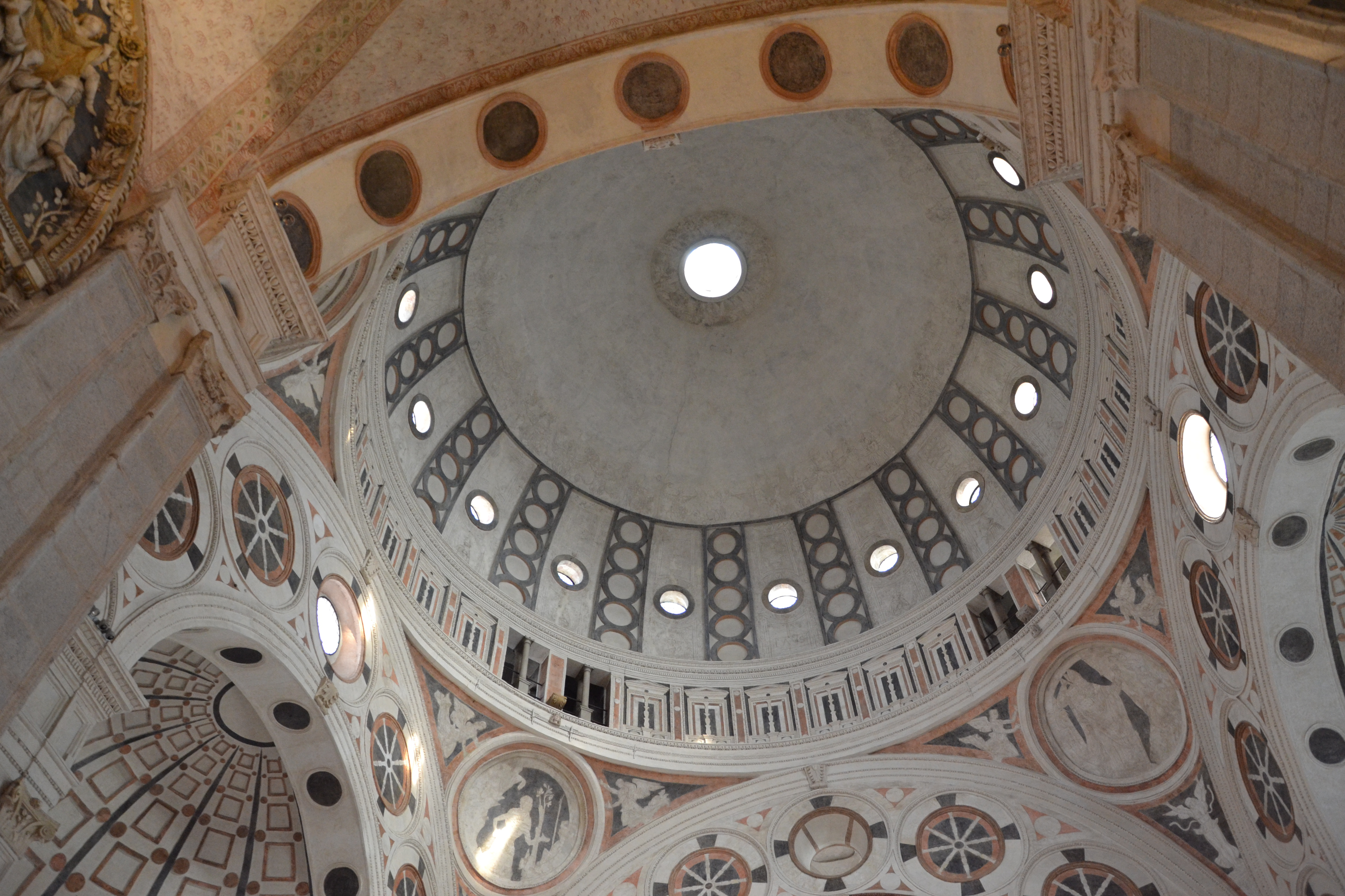 interno della Tribuna Bramantesca, Santa Maria delle Grazie (Milan)